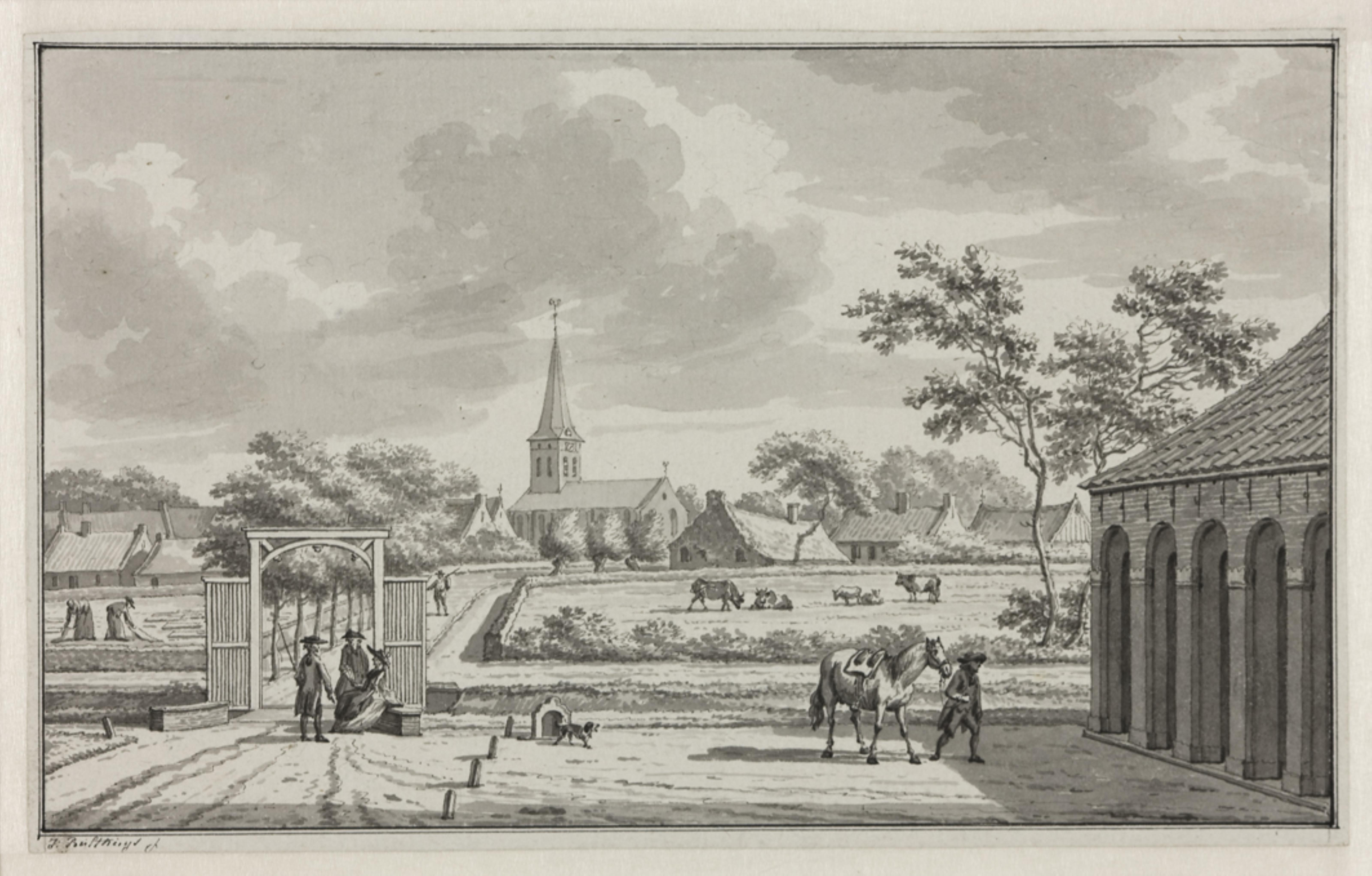 Het dorp Ulrum gezien vanaf de borg Asinga